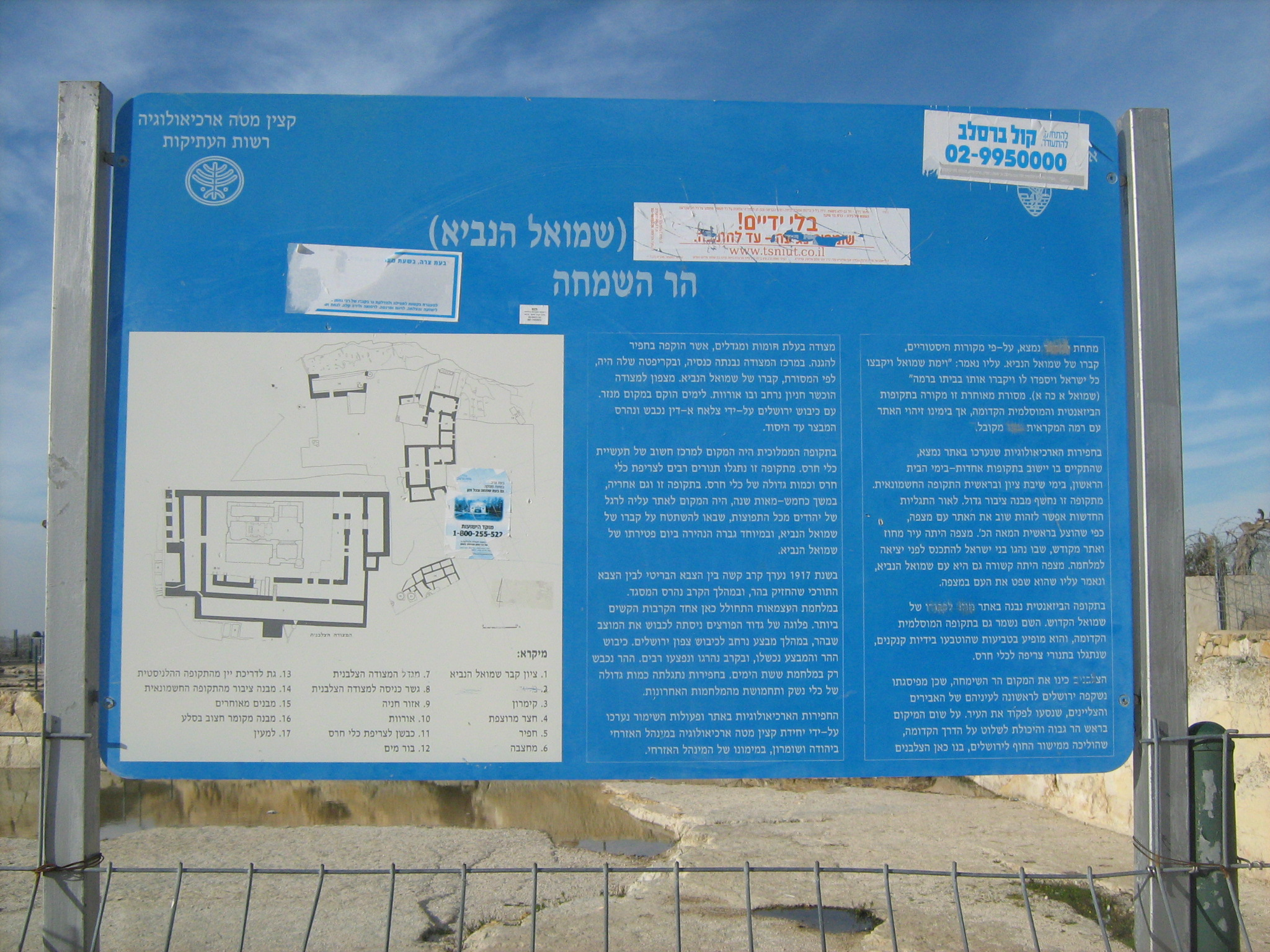 נבי סמואל